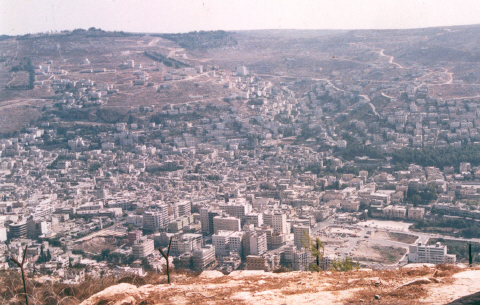 מבט על שכם התמונה צולמה על ידי בשנת 1999.--עמית אבידן 09:59, 2 מרץ 2005 (UTC) An overview of Nablus. pictured 1999